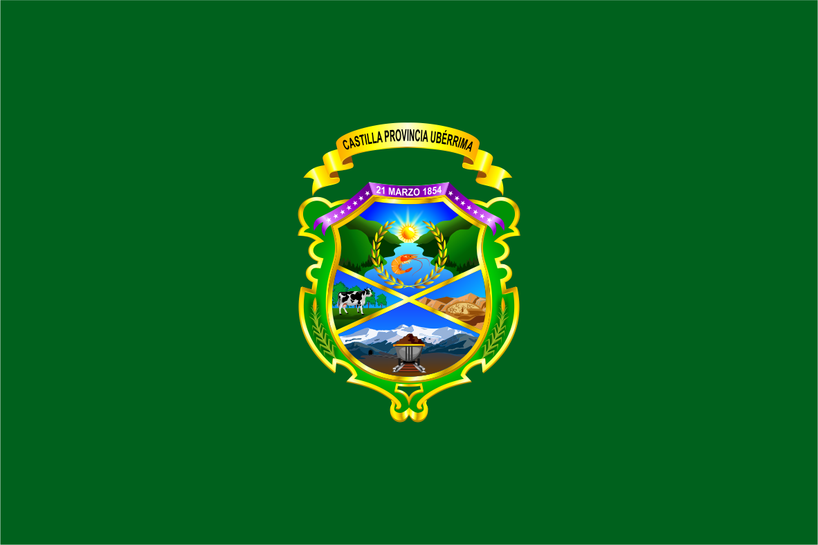 Distrito de Aplao - Provincia de Castilla - Región Arequipa